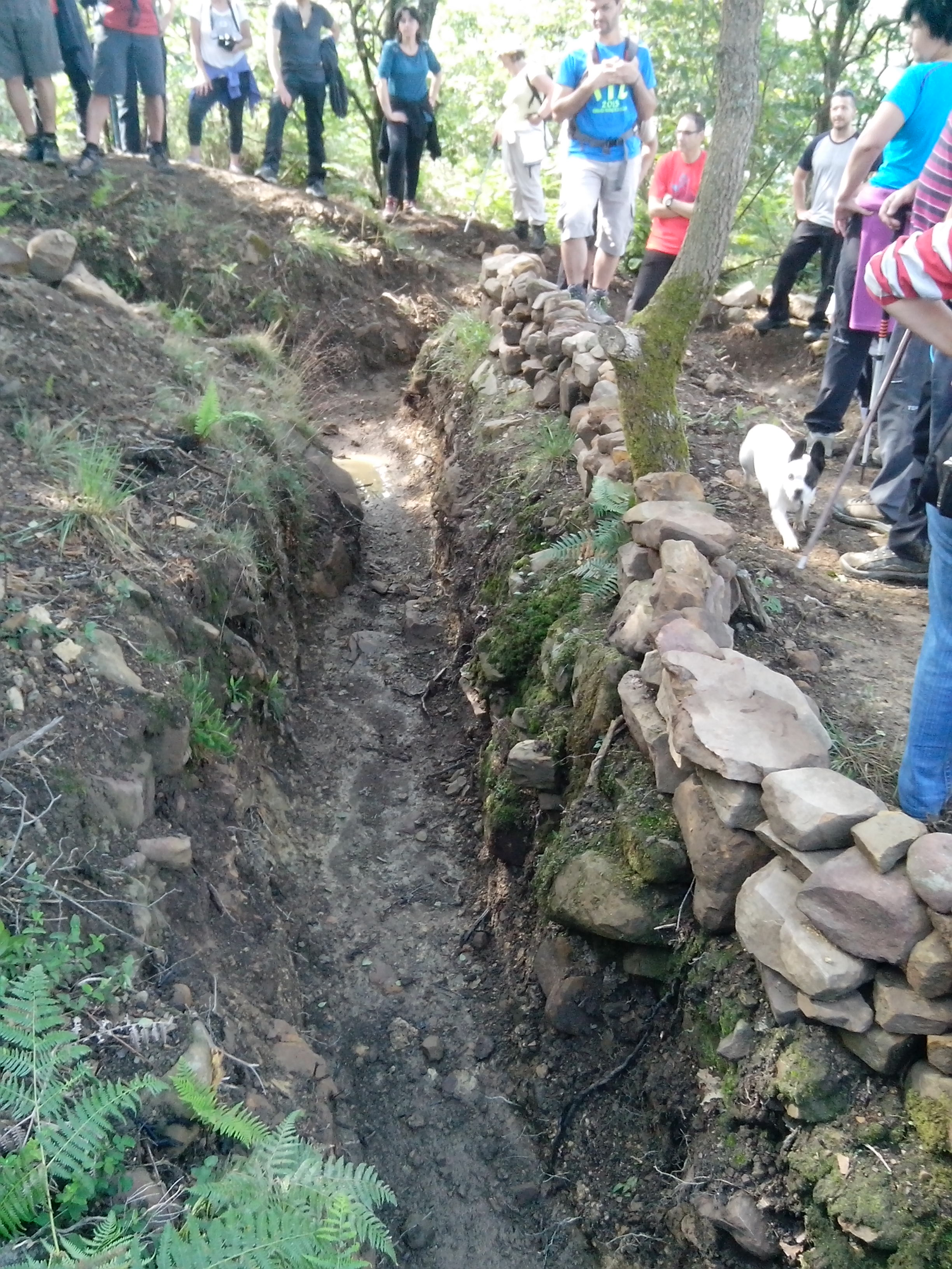 2015-06-20an Txaldatxur mendian dauden 1936eko gerran erabilitako lubakieei egindako bisita